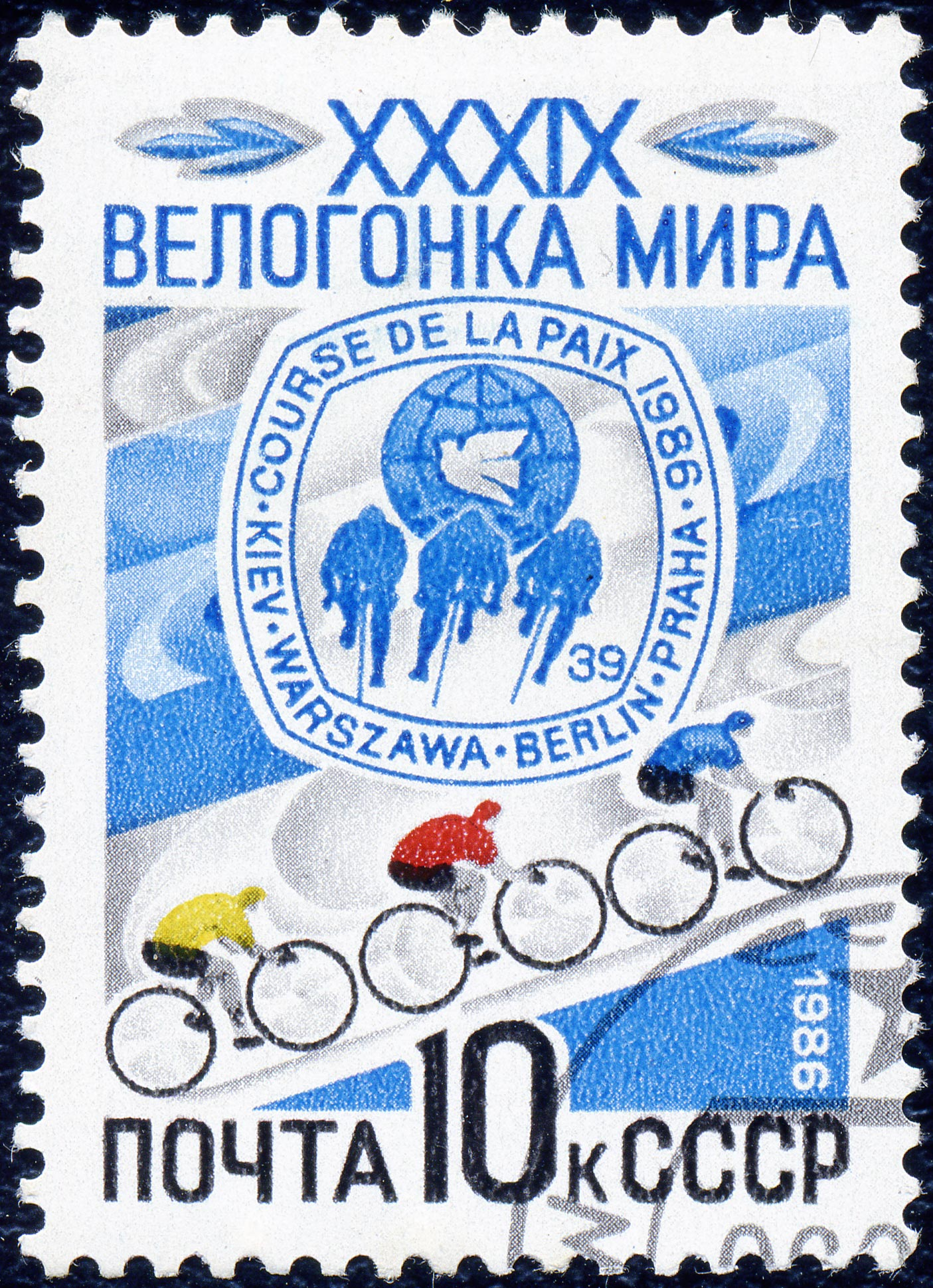 Почтовая марка СССР. 1986. XXXIX велогонка мира